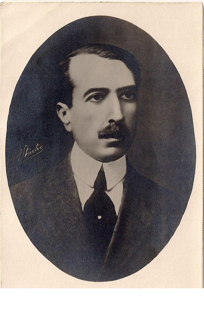 Durante el gobierno de Rafael Núñez se desarrollaron obras públicas que contribuyeron a la modernización de la ciudad. Una importante avenida lleva su nombre.